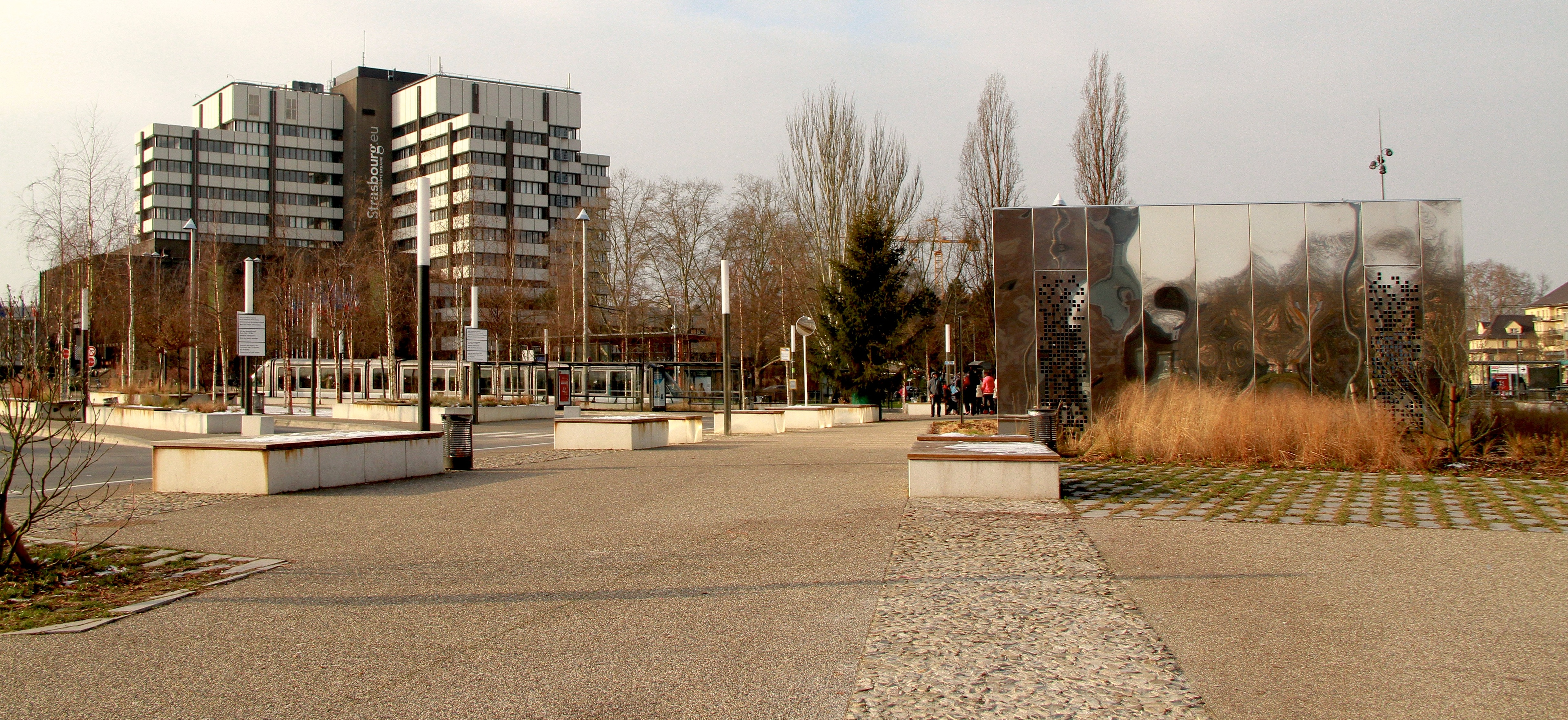 Strasbourg parking d'accueil des cars de tourisme janvier 2013